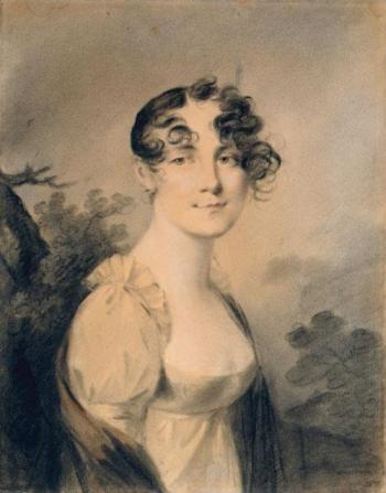 Александра Алексеевна Куракина (1788-1819), в замужестве в1 бр. Салтыкова, во 2 браке Чичерина.